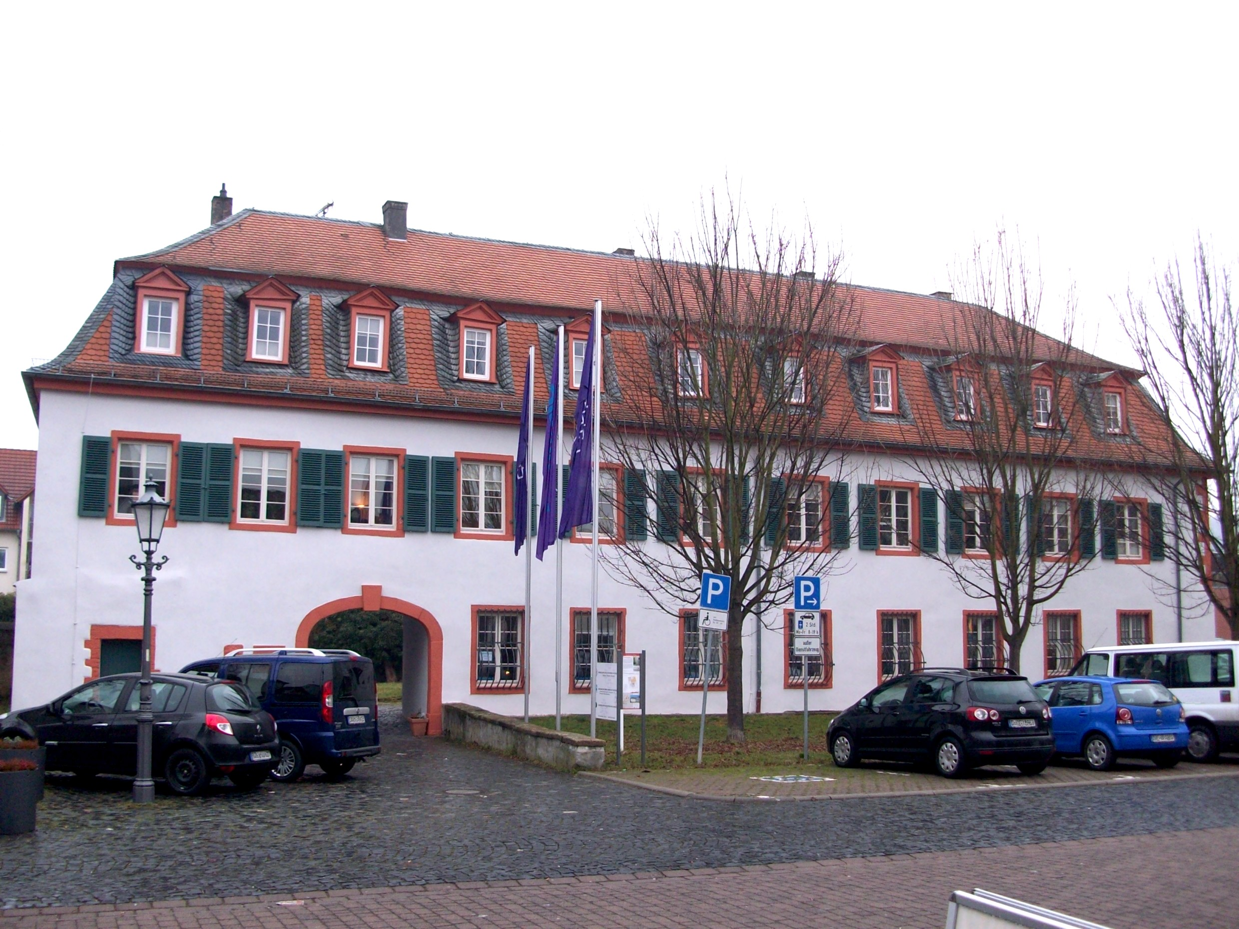 Südflügel mit Hofeingang des Darmstädter Schlosses in Groß-Umstadt